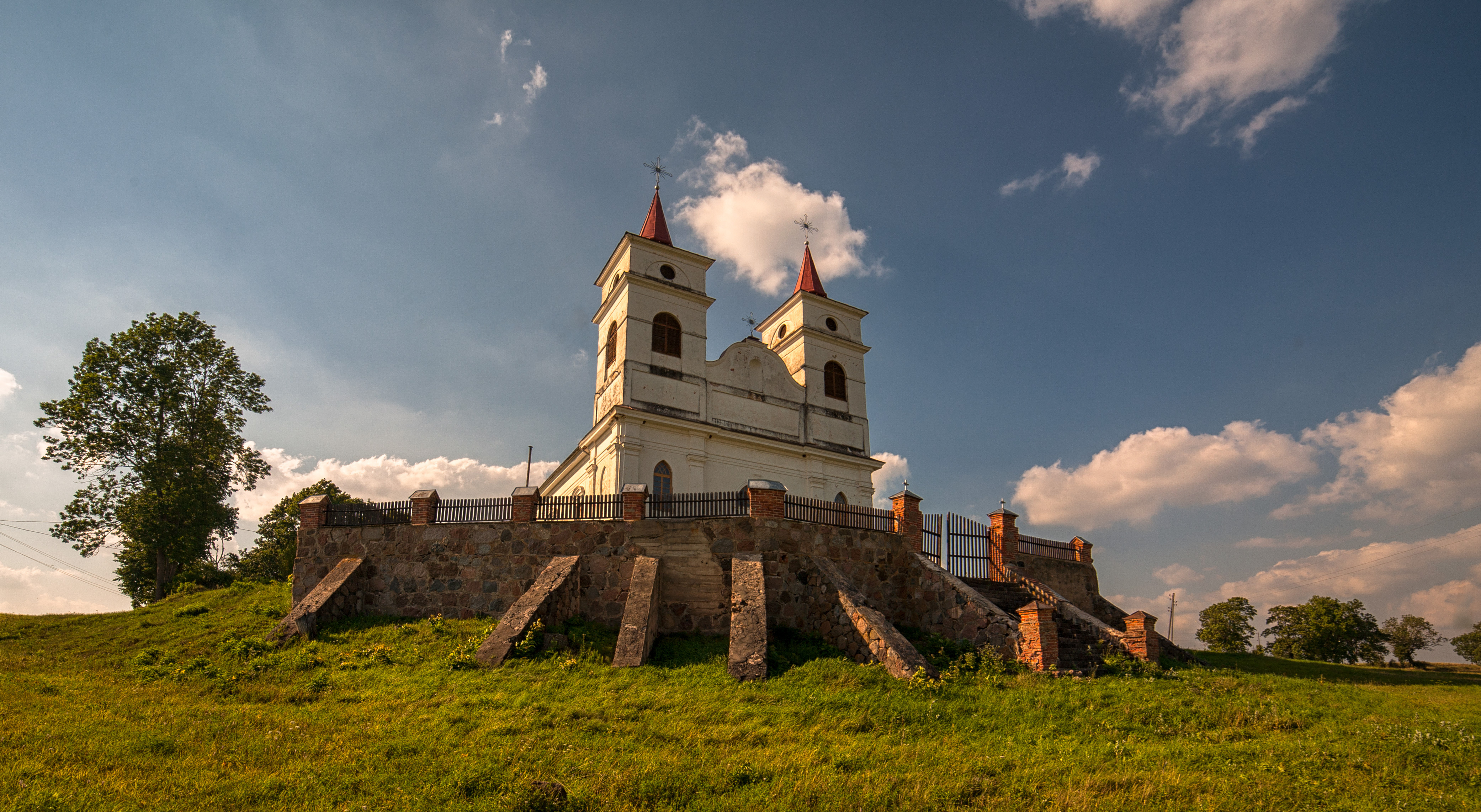 Bērzpils katoļu baznīca, Bērzpils